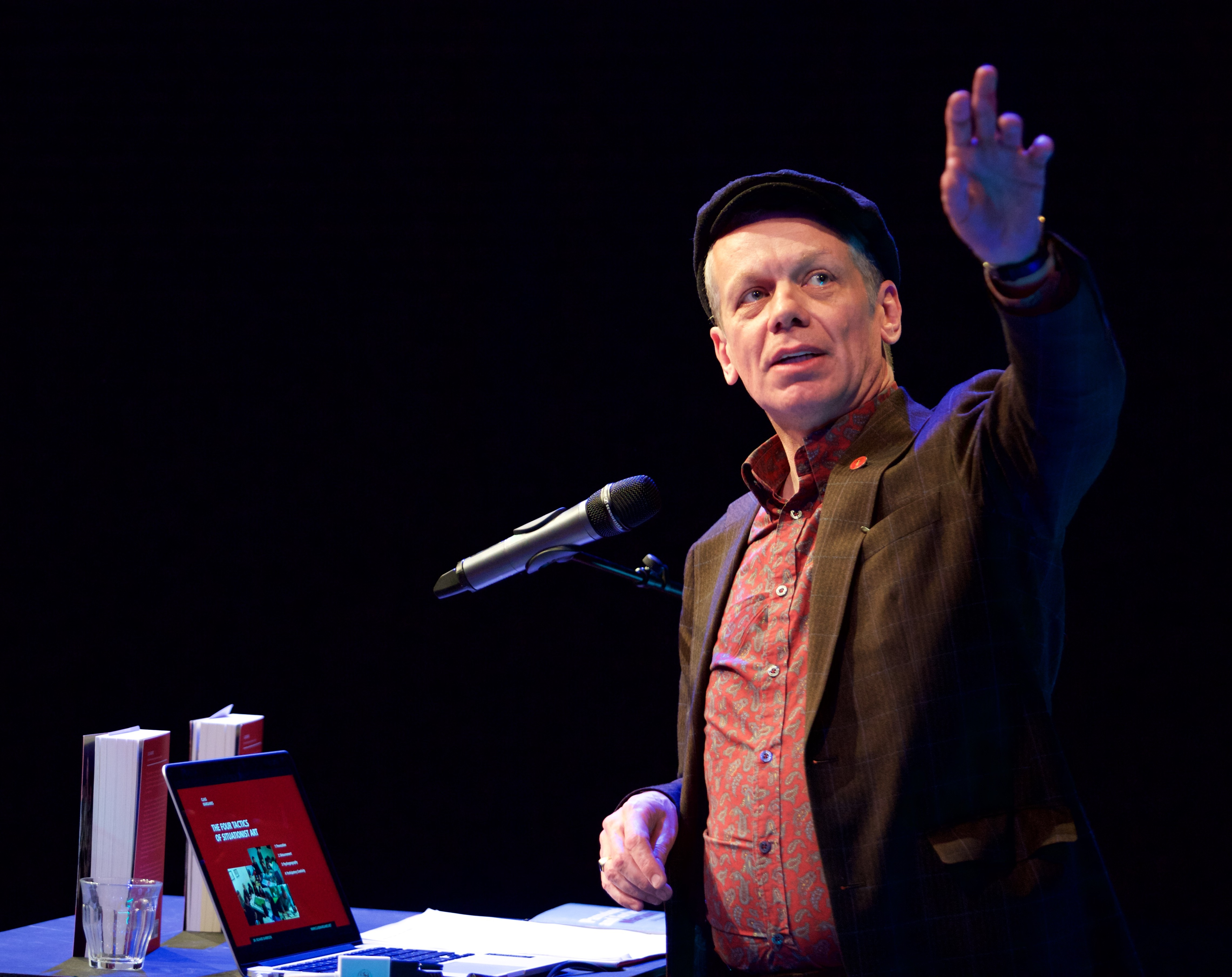 Op 29 en 30 april vond het minifestival New Gamegrounds rond games, theater en de tirannie van de schepper plaats. De Brakke Grond in samenwerking met Playful Arts Festival lieten tijdens het festival de werelden van games, theater en performance bij elkaar komen.